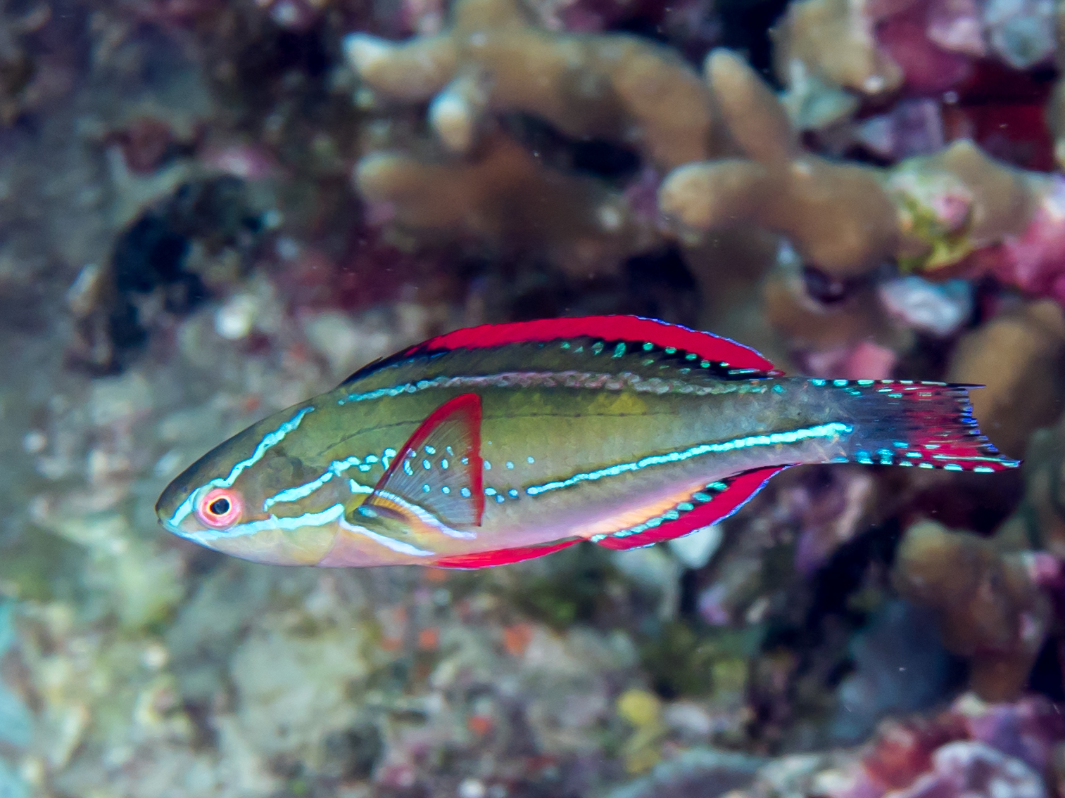 Morotai, Indonesia - Exquisite fairy wrasse (Cirrhilabrus exquisitus)